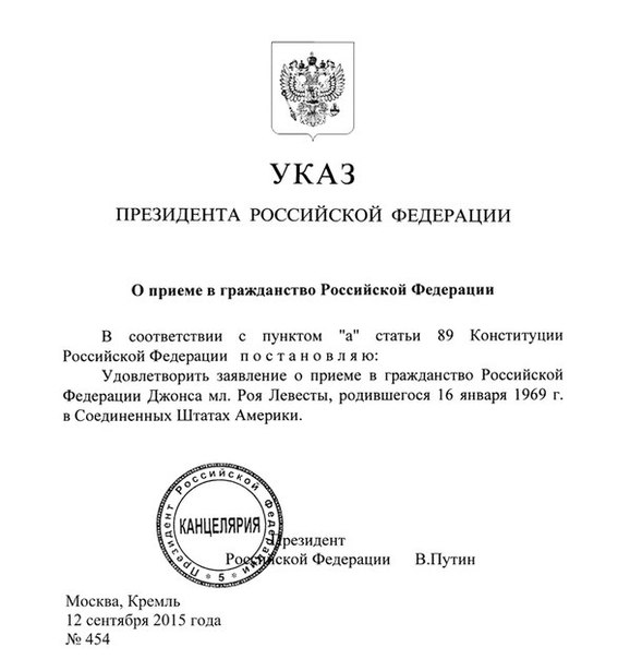 Указ Президента России о гражданстве Роя Джонса